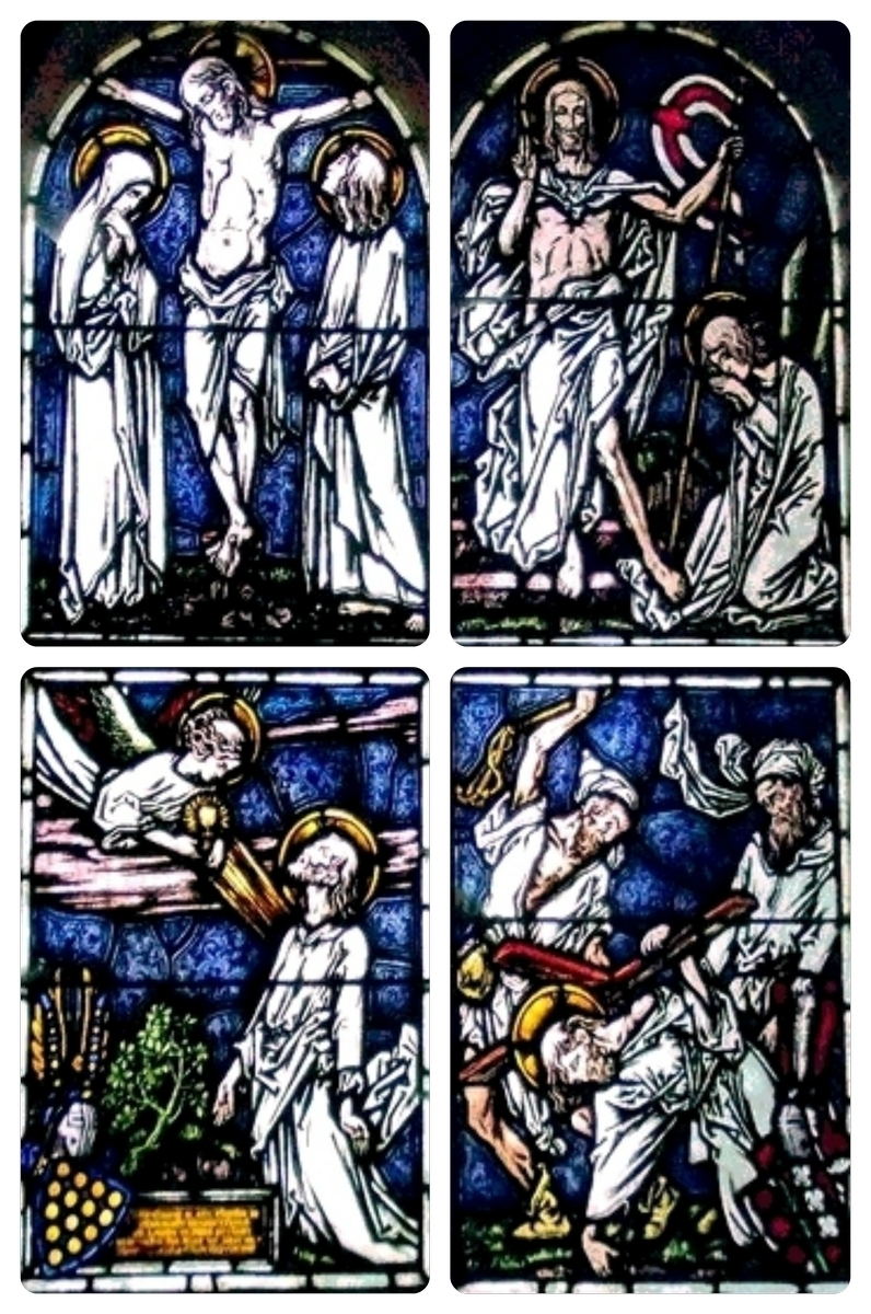 Chorfensterzyklus Marsow, Künstler Fritz Geiges 1911